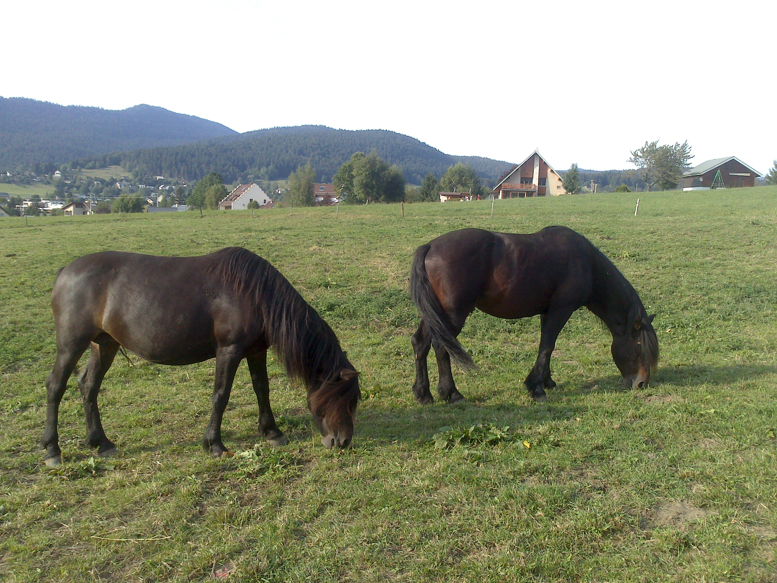 Chevaux Barraquand à Autrans (Isère, Rhône-Alpes, France)